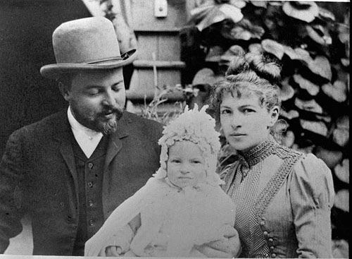 Ф. О. Шехтель с женой и дочерью Китти